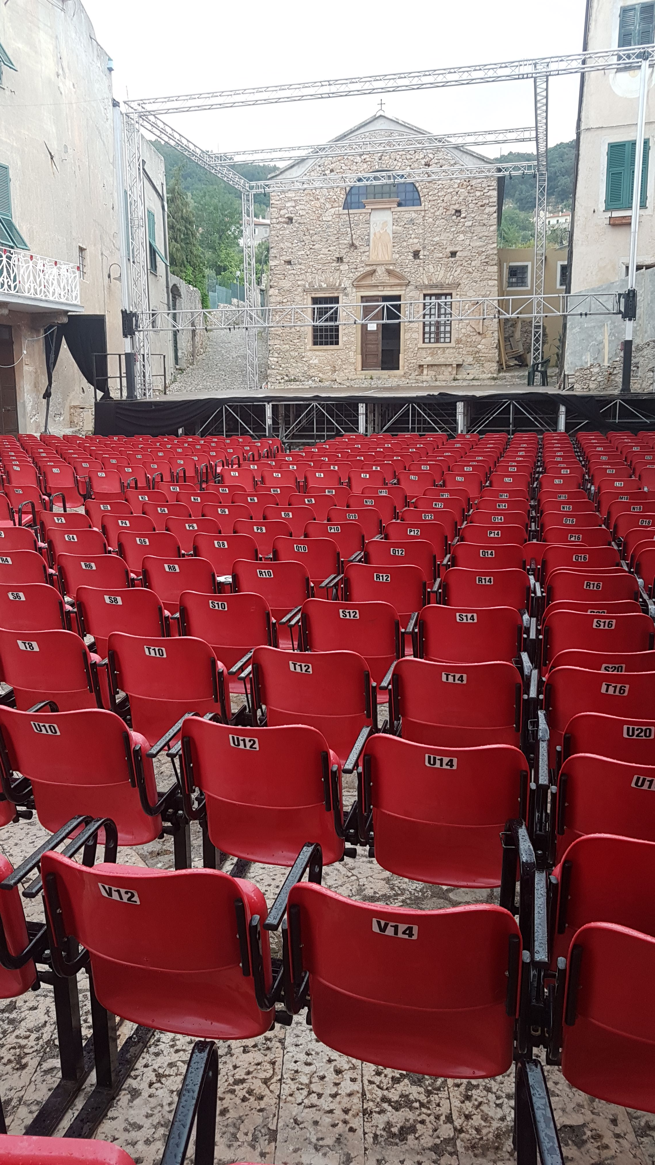 Allestimento Festival teatrale di Borgio Verezzi 2017